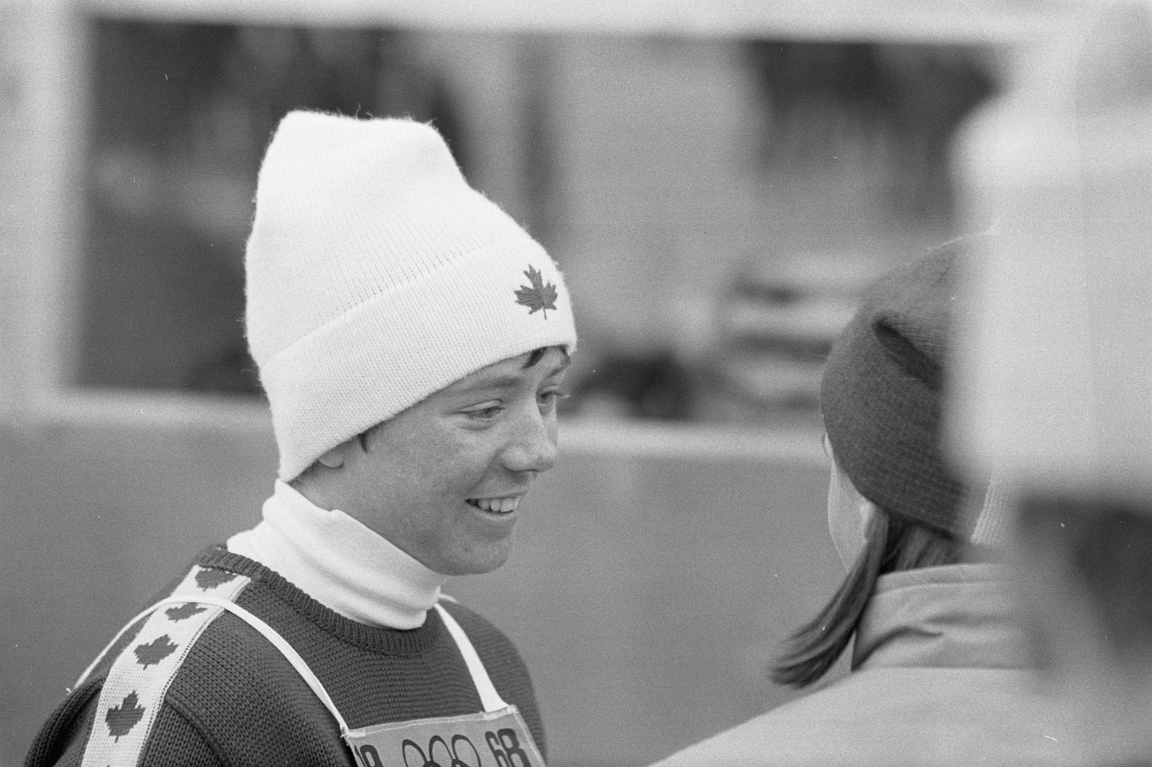 Collectie / Archief : Fotocollectie Anefo Reportage / Serie : [ onbekend ] Beschrijving : Olympische Spelen Grenoble, ski-slalom dames. Nancy Green (Canada 2e) Datum : 13 februari 1968 Locatie : Grenoble Trefwoorden : skien, sport Persoonsnaam : Green Nancy Fotograaf : Kroon, Ron / Anefo Auteursrechthebbende : Nationaal Archief Materiaalsoort : Negatief (zwart/wit) Nummer archiefinventaris : bekijk toegang 2.24.01.05 Bestanddeelnummer : 921-0887